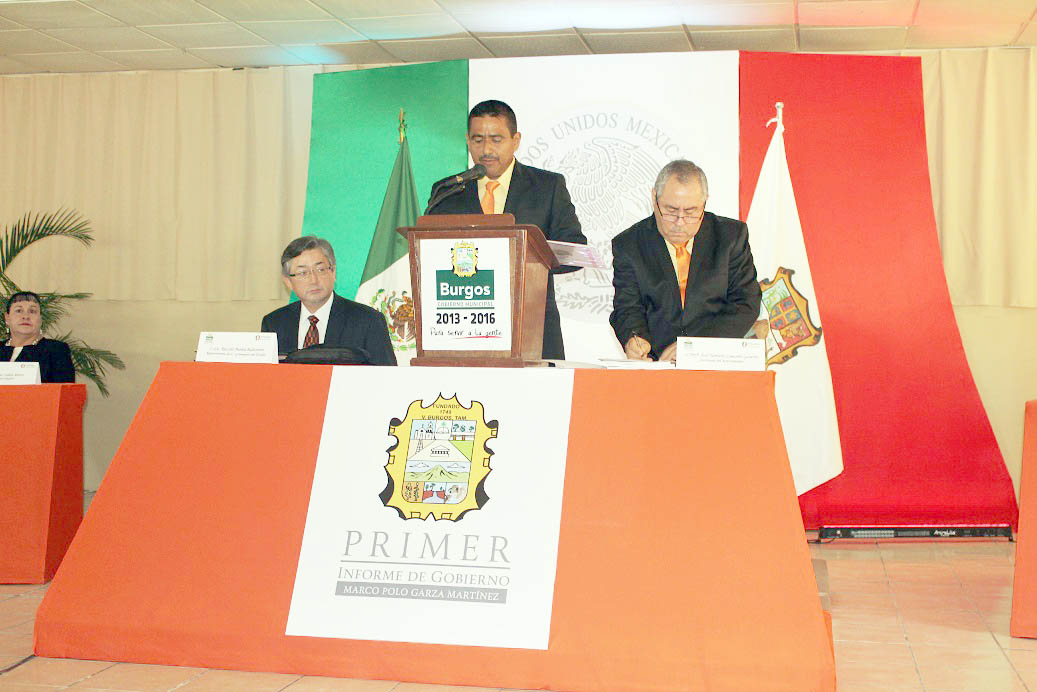 El C. Marco Polo Garza Martínez, Presidente Municipal de Burgos (2014-Actual) rindiendo el Primer Informe de Gobierno, a su derecha el Profr.José Humberto Camarillo Gutiérrez y su izquierda el Lic. Ricardo Puebla Ballesteros, representante territorial del Gobernado Egidio Torre Cantú.